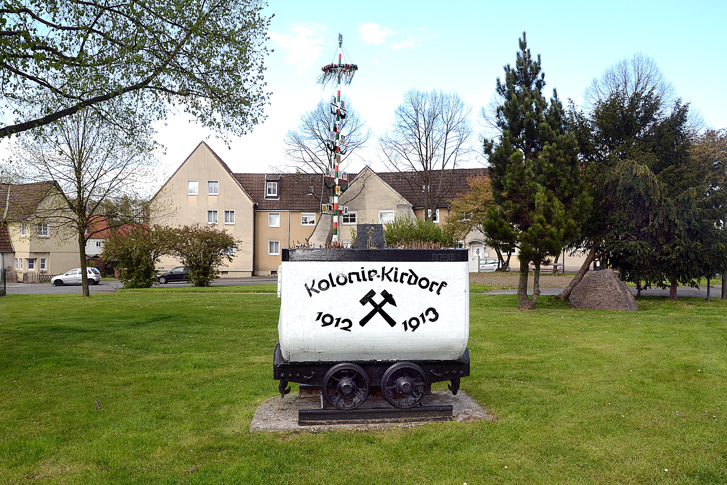 Kolonie Kirdorf: Zechenlore in Dortmund-Eving, Wrangelstraße